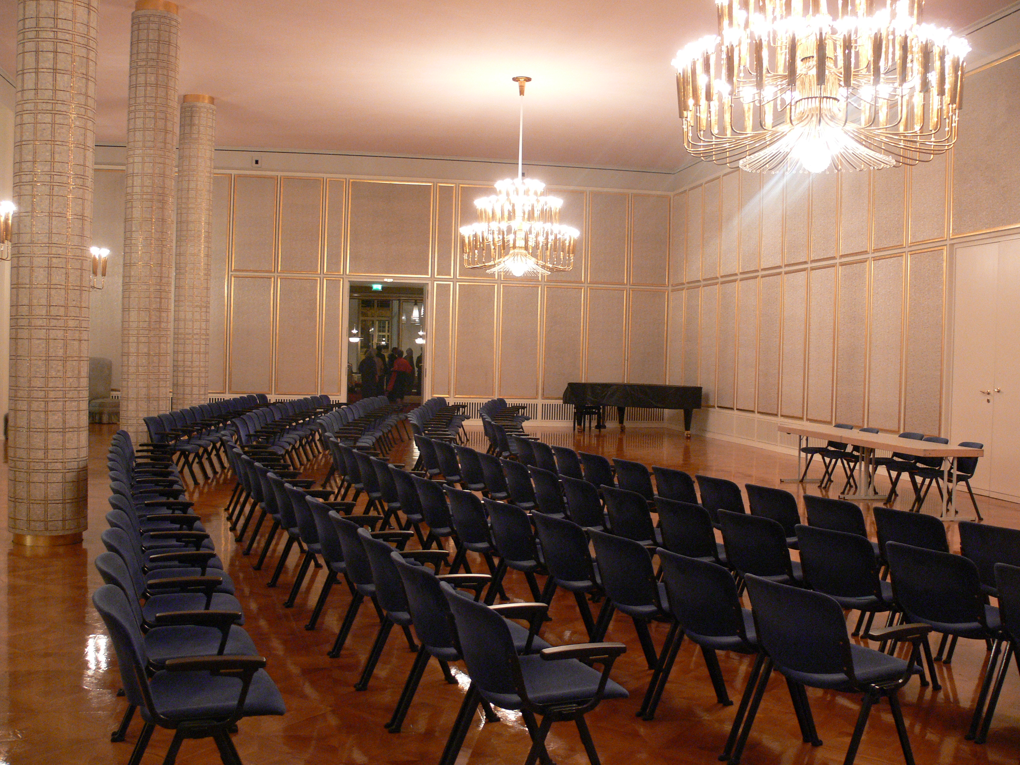 Opernhaus Leipzig, Rangfoyer